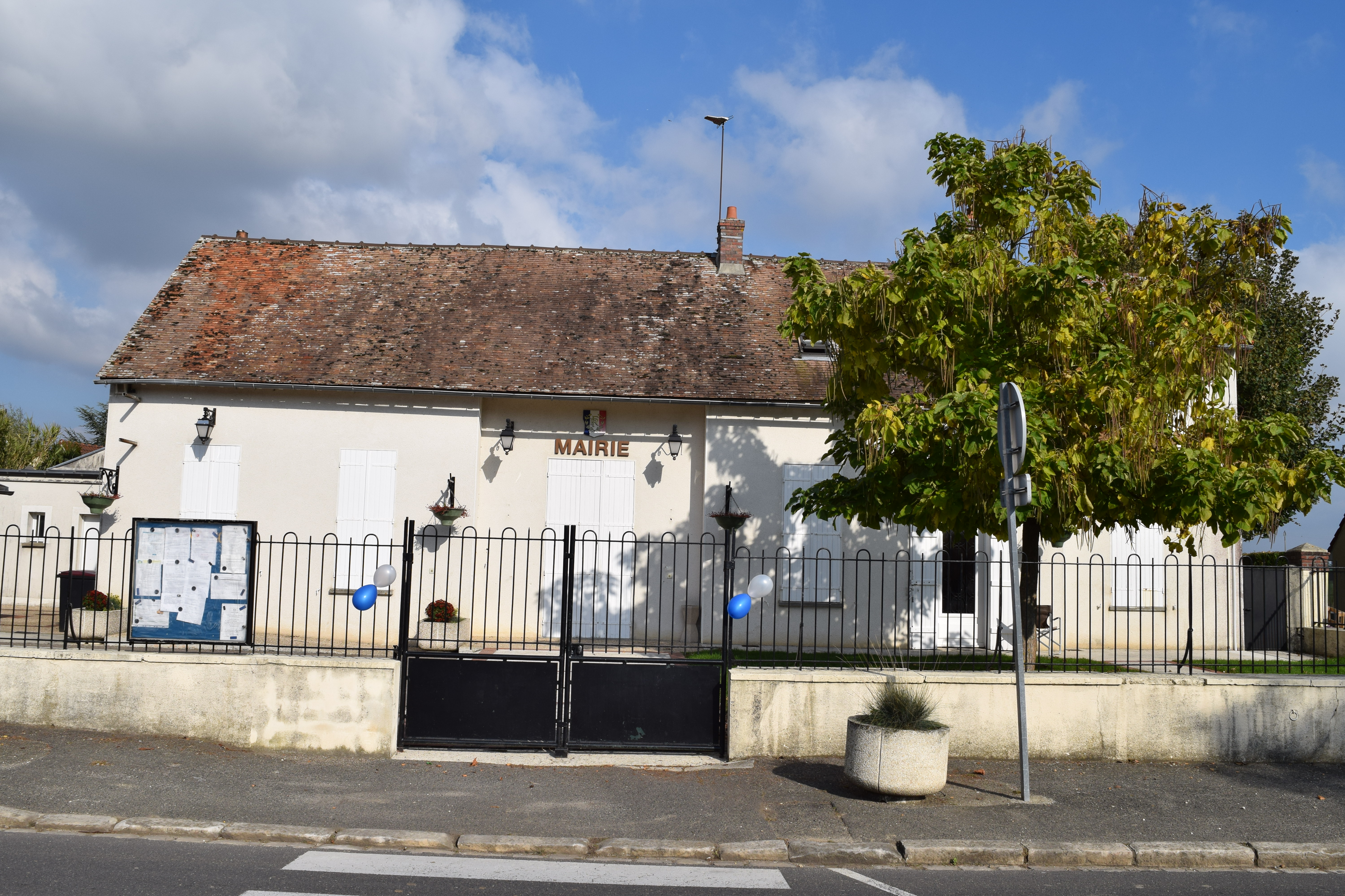 Mairie de Bailly-Carrois